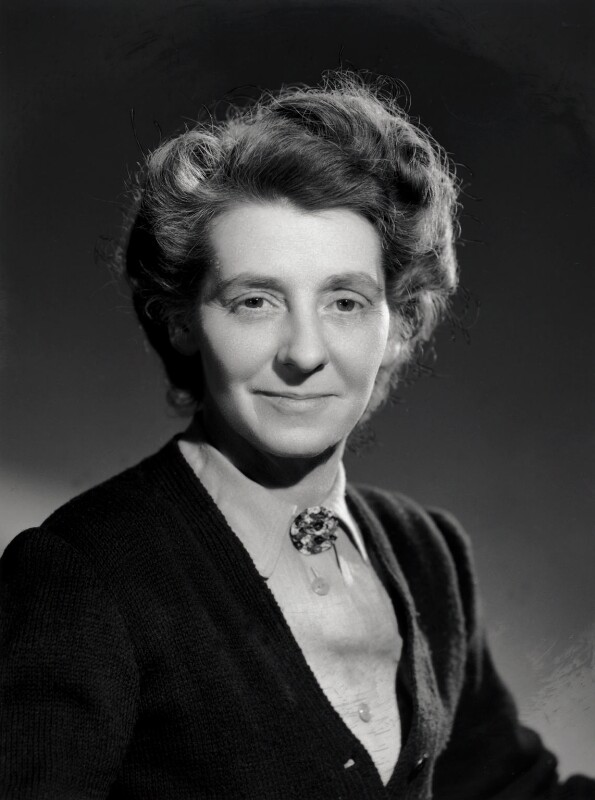 Freda Corbet